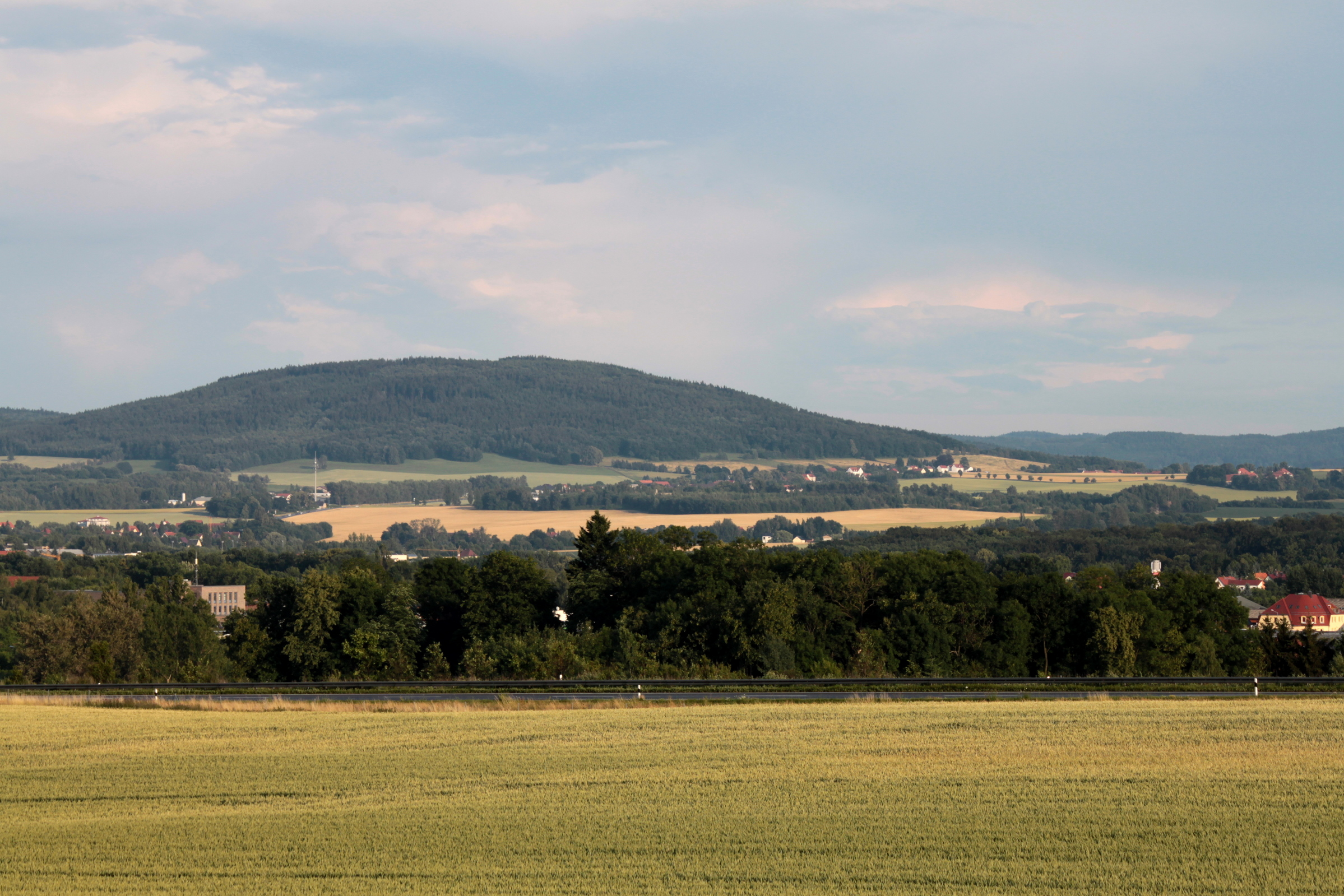 Blick von Salzenforst zum Thromberg. Hornjoserbsce: Pohlad na Lubin ze Słoneje Boršće.